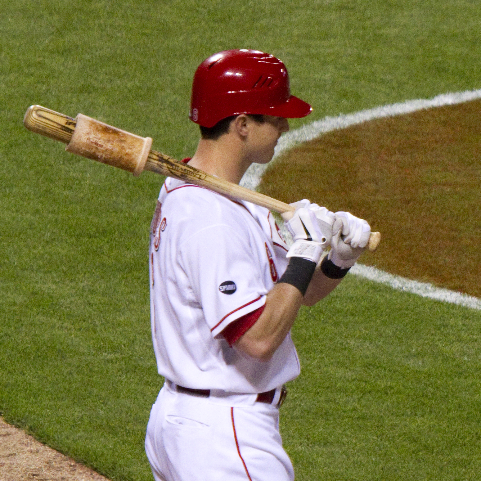 Drew Stubbs